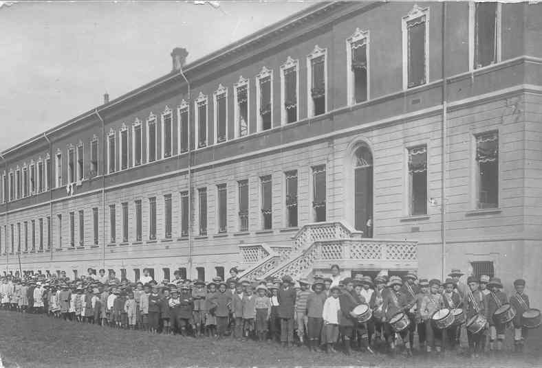 Scuole elementari di Mirandola - pronti per una passeggiata (1915)